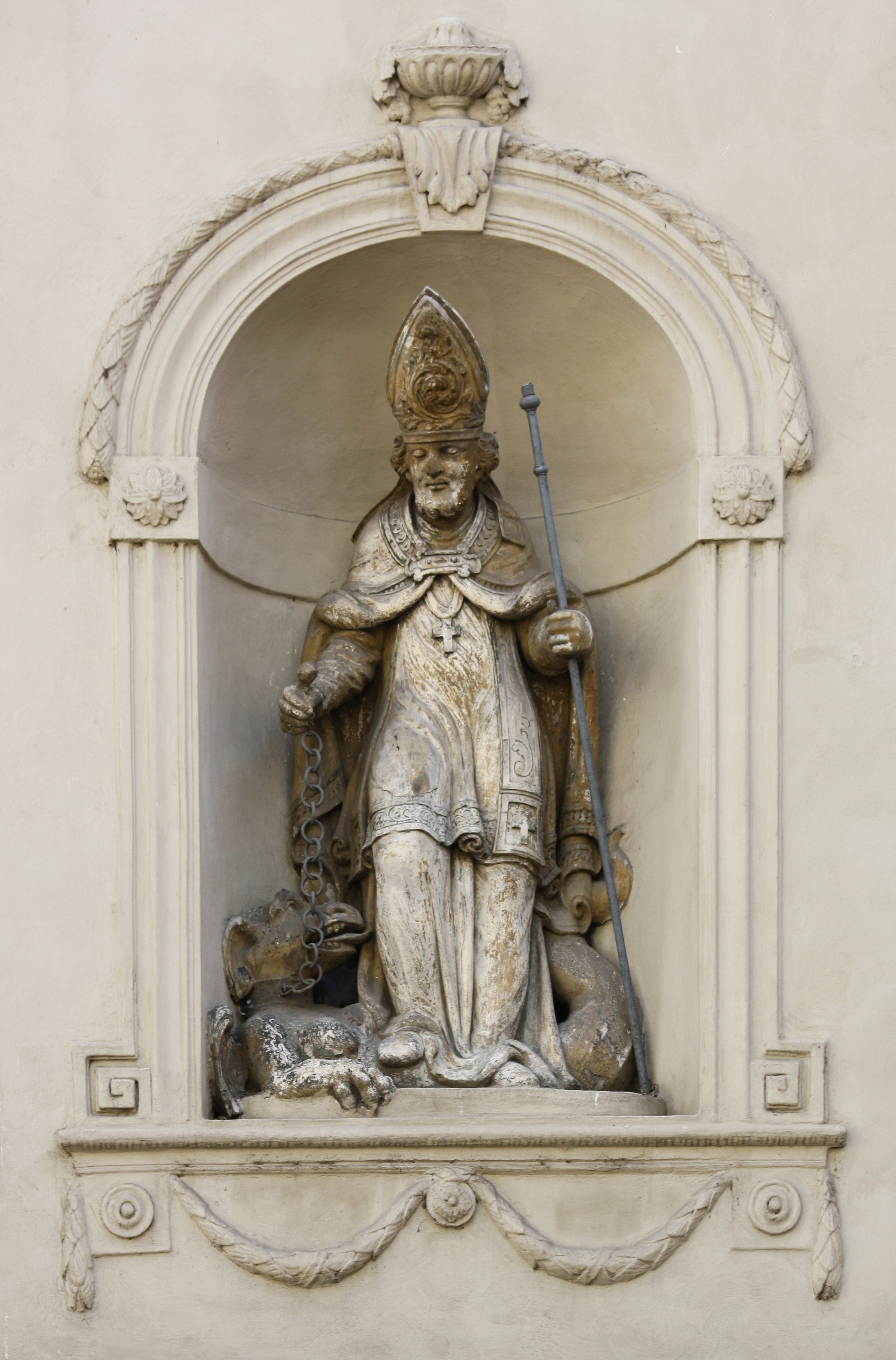 Praha, Malá Strana - Prokopská (světec)